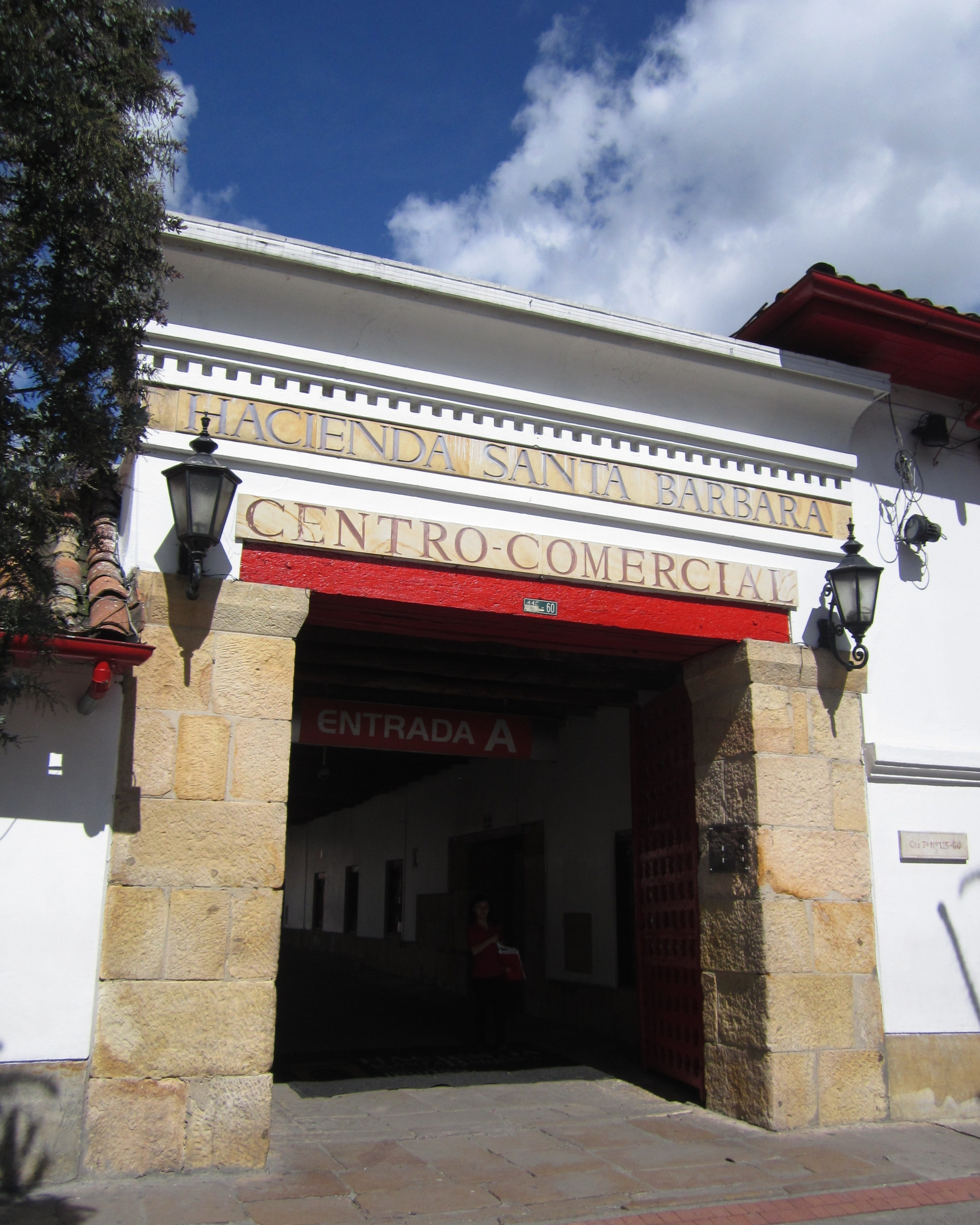 Av. carrera 7, portal del centro comercial Hacienda Santa Bárbara. Localidad de Usaquén.